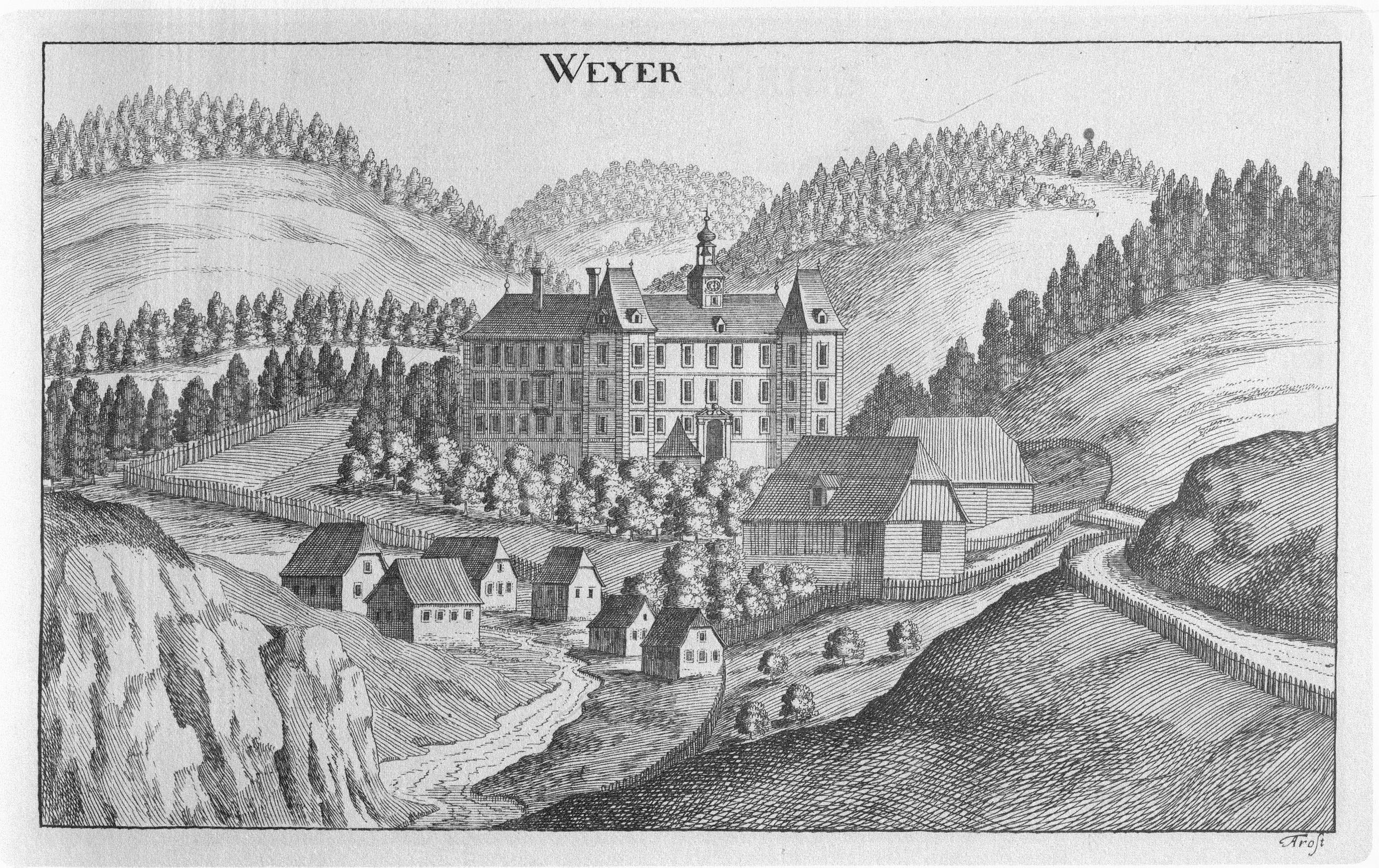 G. M. Vischers Käyserlichen Geographi, Topographia Ducatus Stiriae, Das ist: Eigentliche Delineation / und Abbildung aller Städte / Schlösser / Marcktfleck / Lustgärten / Probsteyen / Stiffter / Clöster und Kirchen / so es sich im Herzogthumb Steyrmarck befinden; Und anjetzo Umb einen billichen Preyß zu finden seynd Bey Johann Bitsch Universitäts Buchhandlern / Auff dem Juden=Platz bey der guldenen Saulen. Graz 1681 Die Nummerierung der Dateien folgt der alphabetischen Reihung der Ortsnamen und entspricht nicht dem Vischer-Register